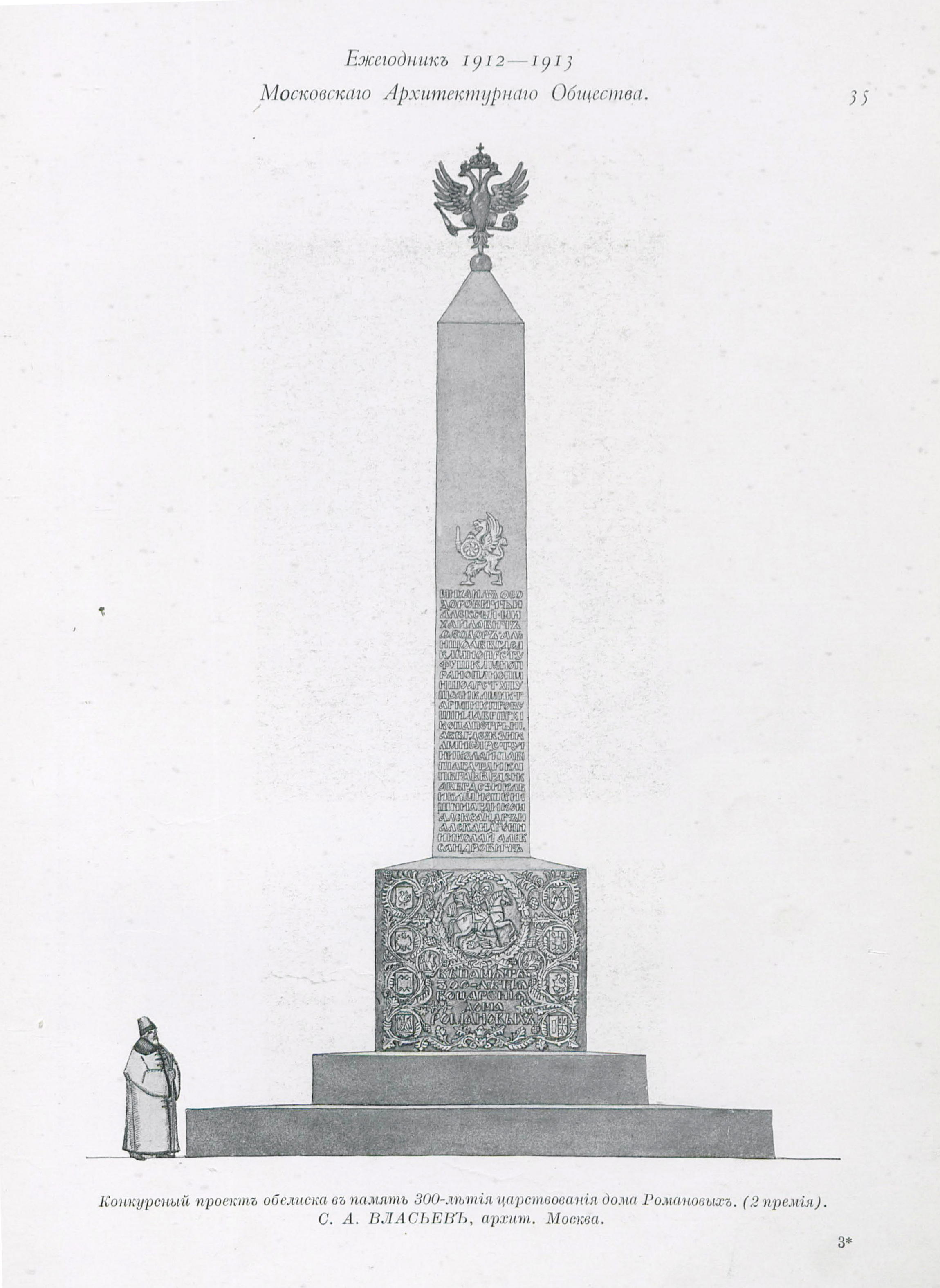 Конкурсный проект обелиска в память 300-летия царствования дома Романовых. (2-я премия) С. А. Власьев. Скан из ежегодника Московского Архитектурного Общества. 1912-1913 гг